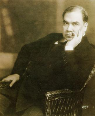 Félix Rubén García Sarmiento, conocido como Rubén Darío (Metapa, hoy Ciudad Darío, Matagalpa, 18 de enero de 1867 - León, 6 de febrero de 1916), fue un poeta nicaragüense, máximo representante del Modernismo literario en lengua española. Es posiblemente el poeta que ha tenido una mayor y más duradera influencia en la poesía del siglo XX en el ámbito hispánico. Es llamado príncipe de las letras castellanas.